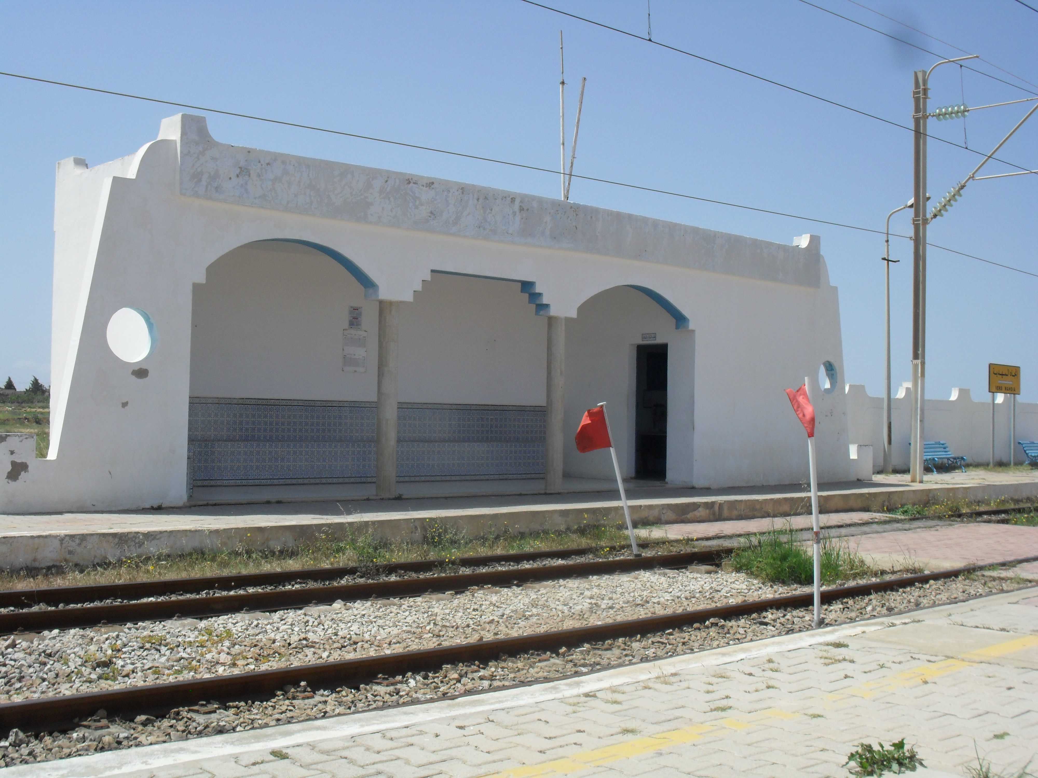 Станція Махдія-Туристична зона